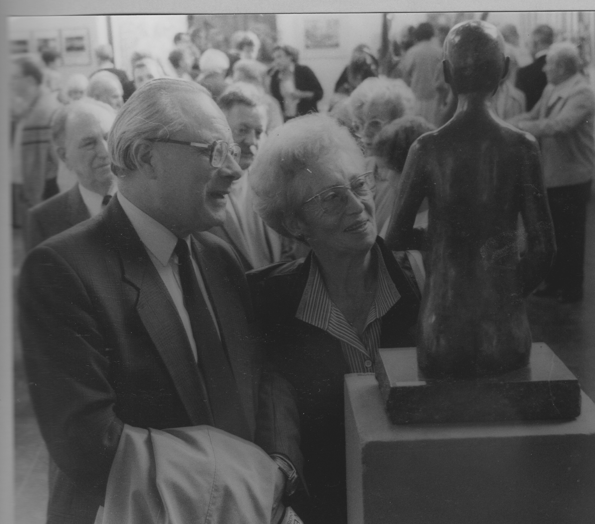 Betreft burgemeester Gilbert Temmerman en zijn echtgenote naar aanleiding van een opening van een tentoonstelling. Temmerman was burgemeester te Gent van 1989 tot 1994.